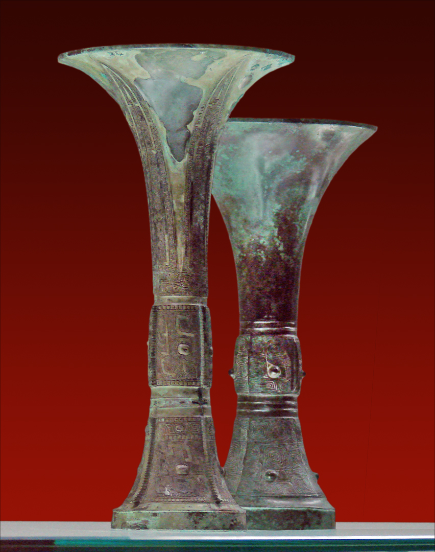 Coupes Gu pour les boissons fermentées. Bronze. Époque de Anyang (vers 1300-vers 1050 av. J.-C.). Dynastie des Shang (vers 1550 - vers 1050 av. J.-C.). Chine. Musée Cernuschi (ville de Paris). Référence : page correspondante sur le site du musée Cernuschi.